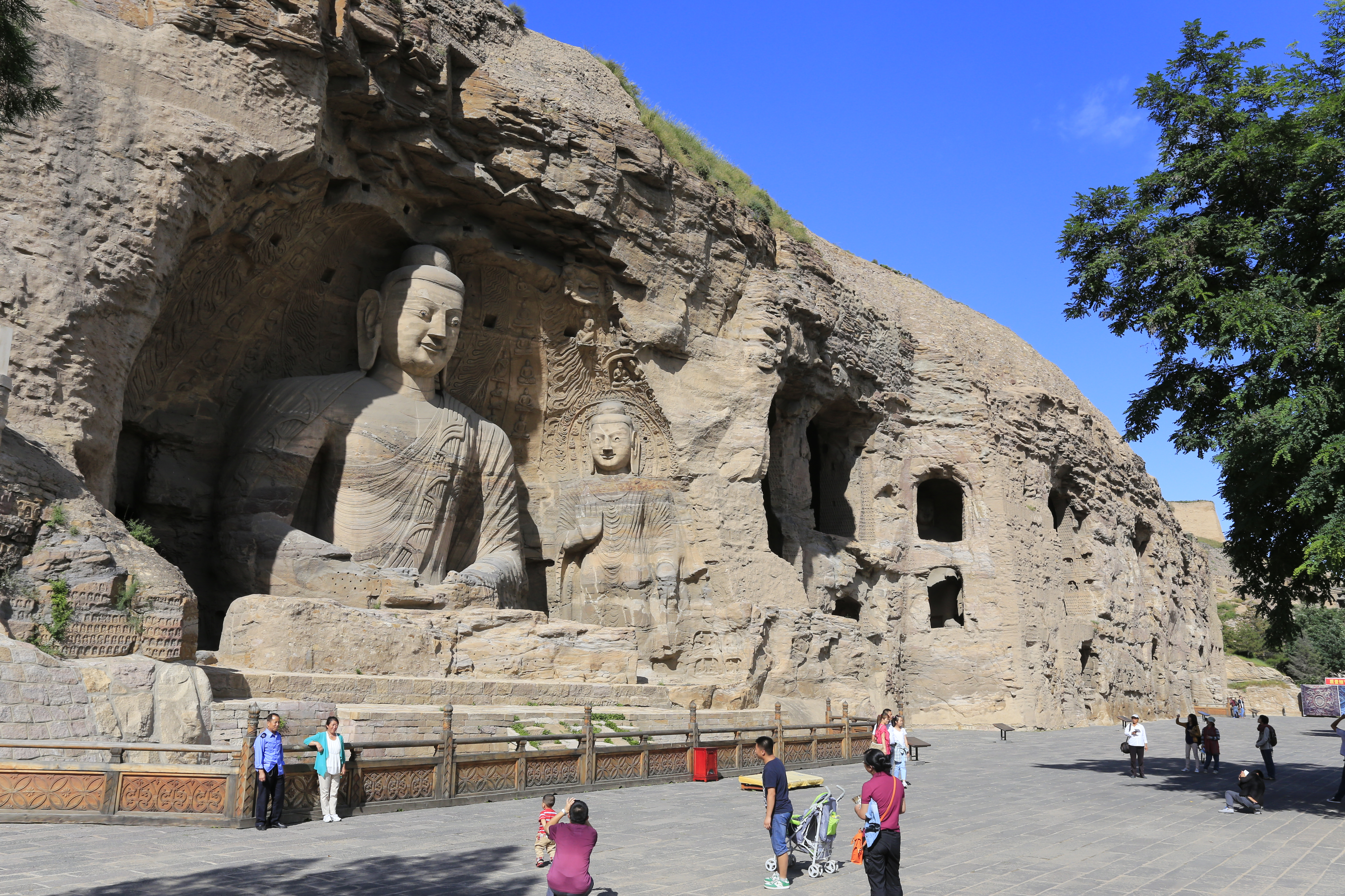 大同云冈石窟—— 第20窟、第19窟